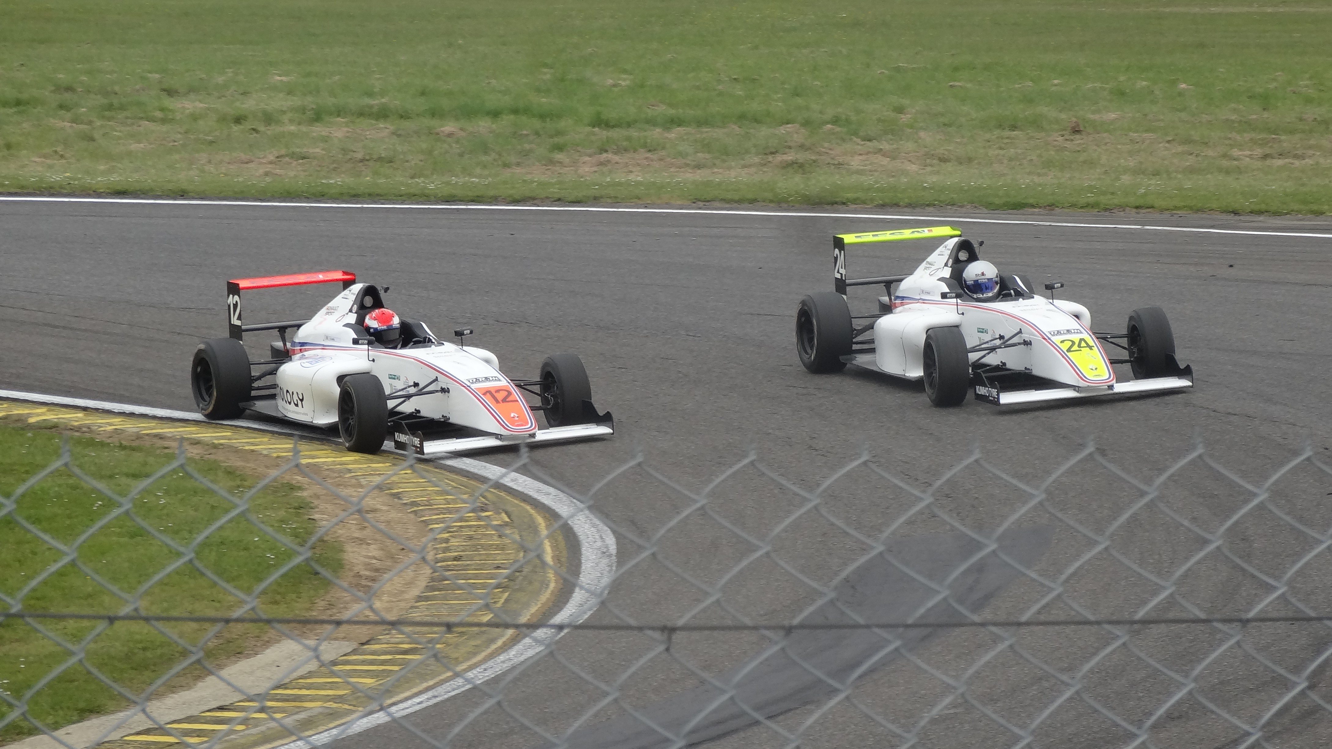 52e Coupes de Pâques (sport automobile), sur le Circuit Paul Armagnac à Nogaro (Gers) : F4 France - Ugo Gazil (à gauche) et Mathis Poulet (à droite) durant la course 3.